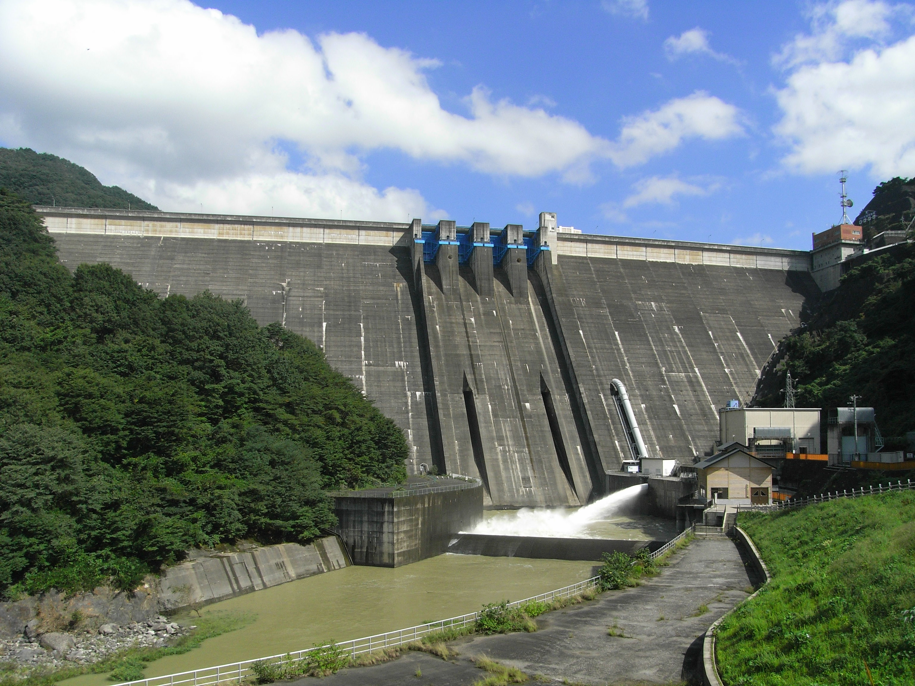 Dam